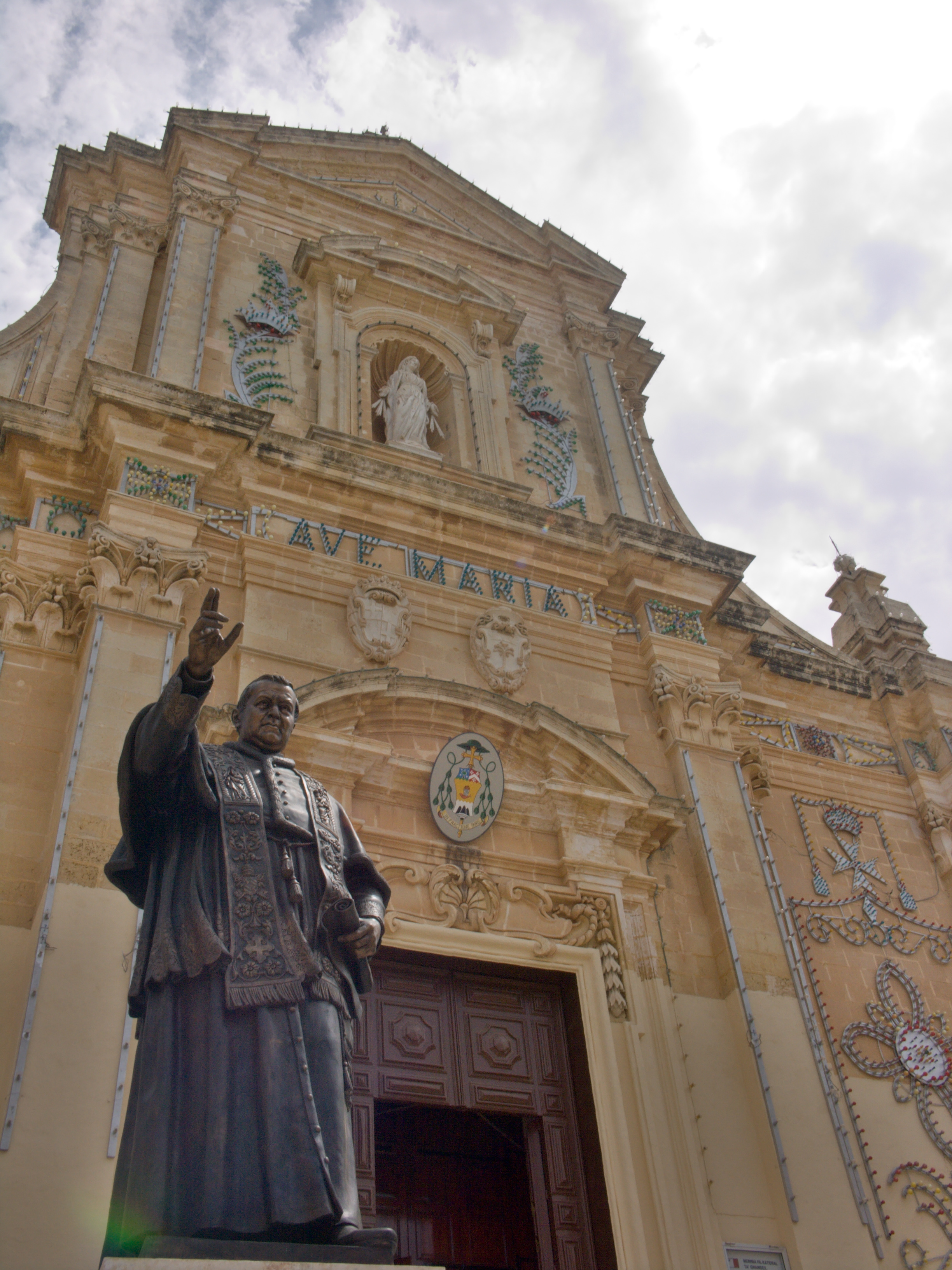 Cathédrale de Victoria à Gozo (Malte)